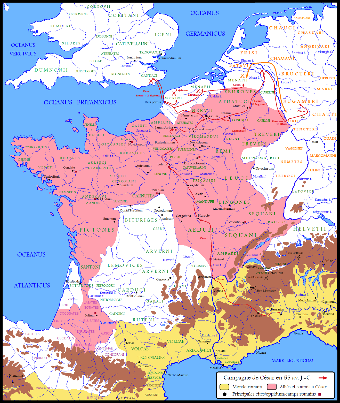 La Gaule en 55 av. J.-C. / Quatrième année de campagne de César